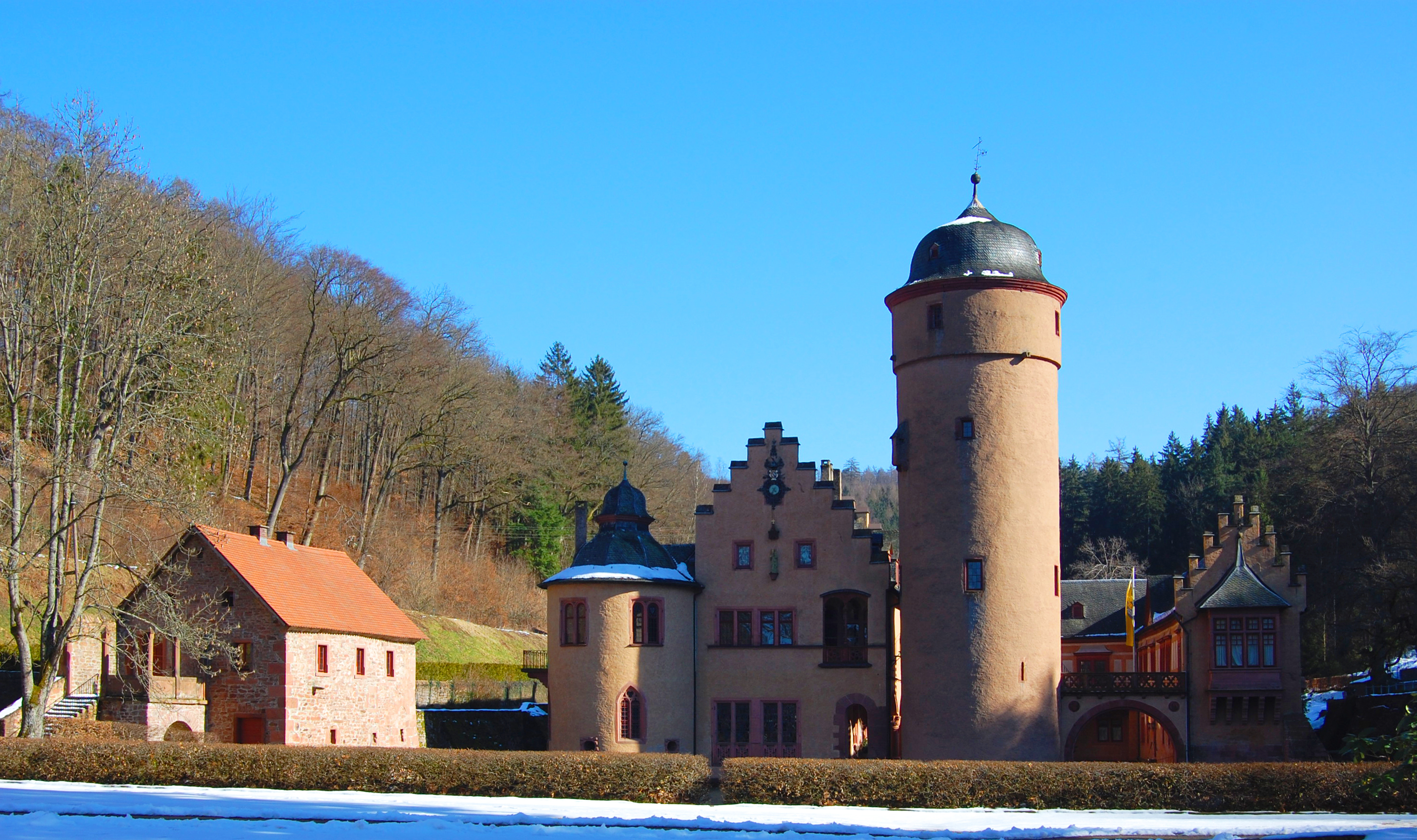 Schloss Mespelbrunn